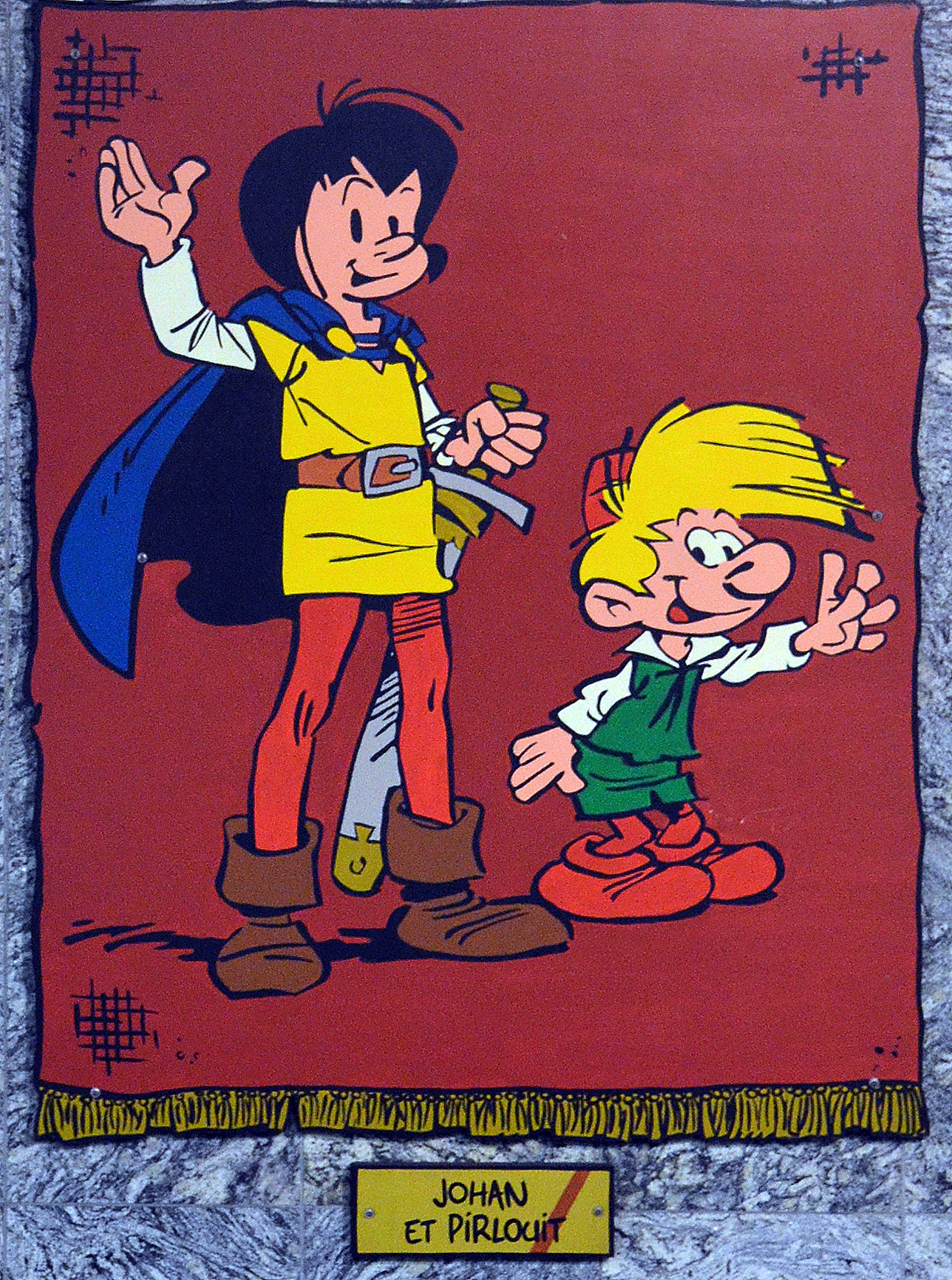 Charleroi (Belgique) - Station Janson du métro léger. Johan et Pirlouit